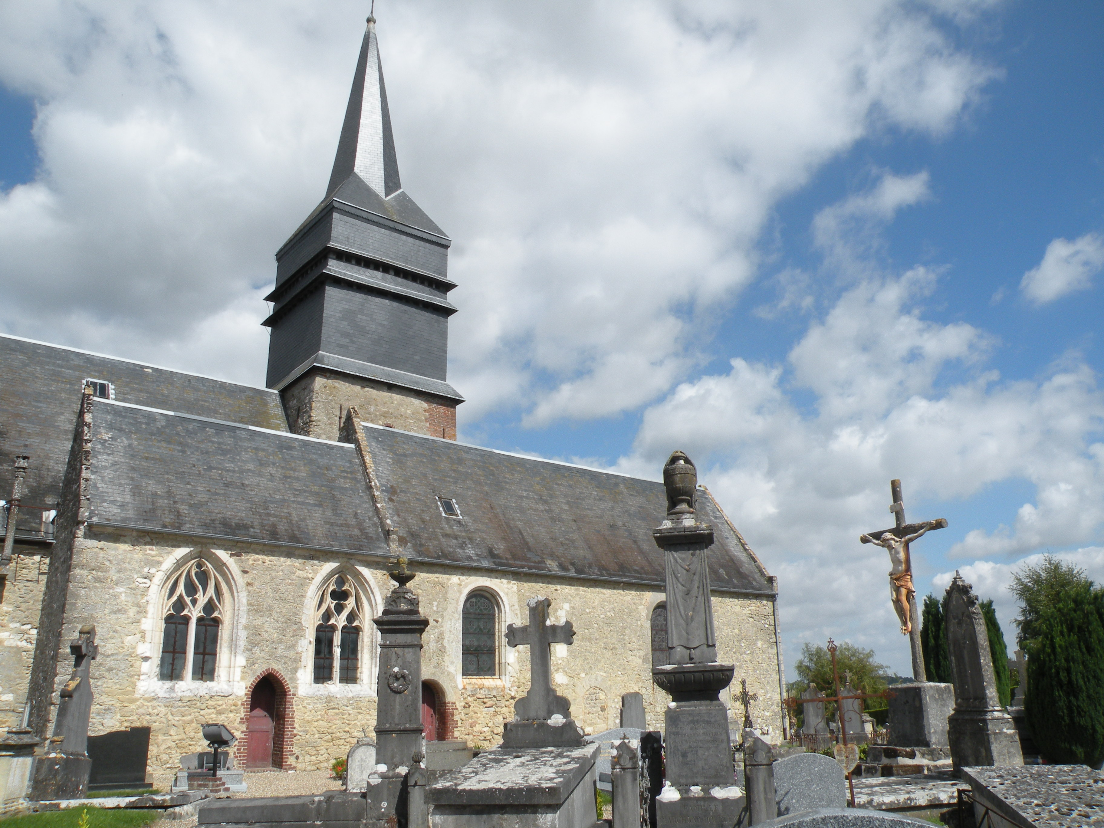 Église Saint-Martin de Senantes (Oise)